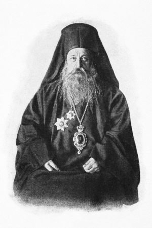 Константинос Матулопулос